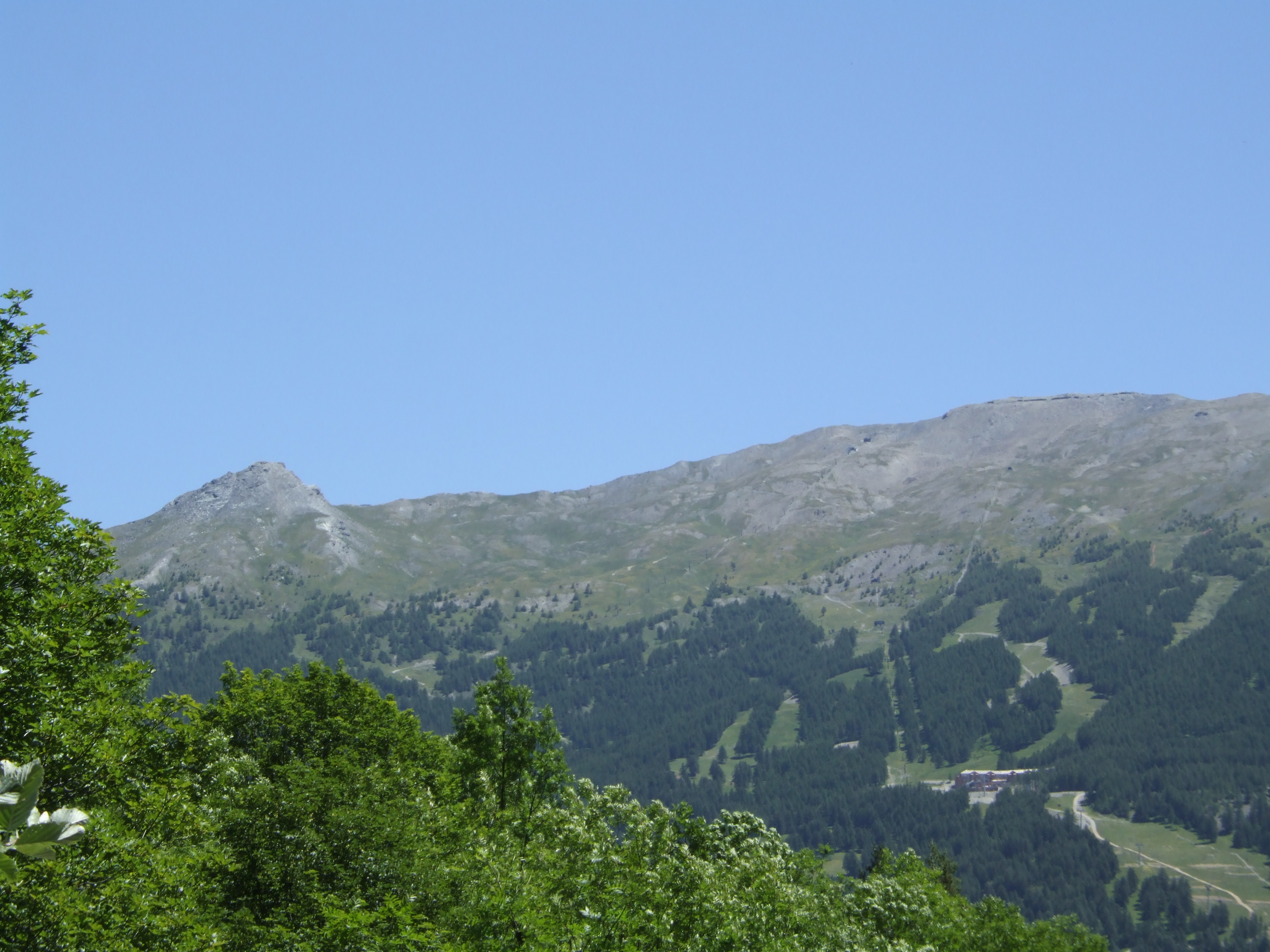 Utente:K.Weise